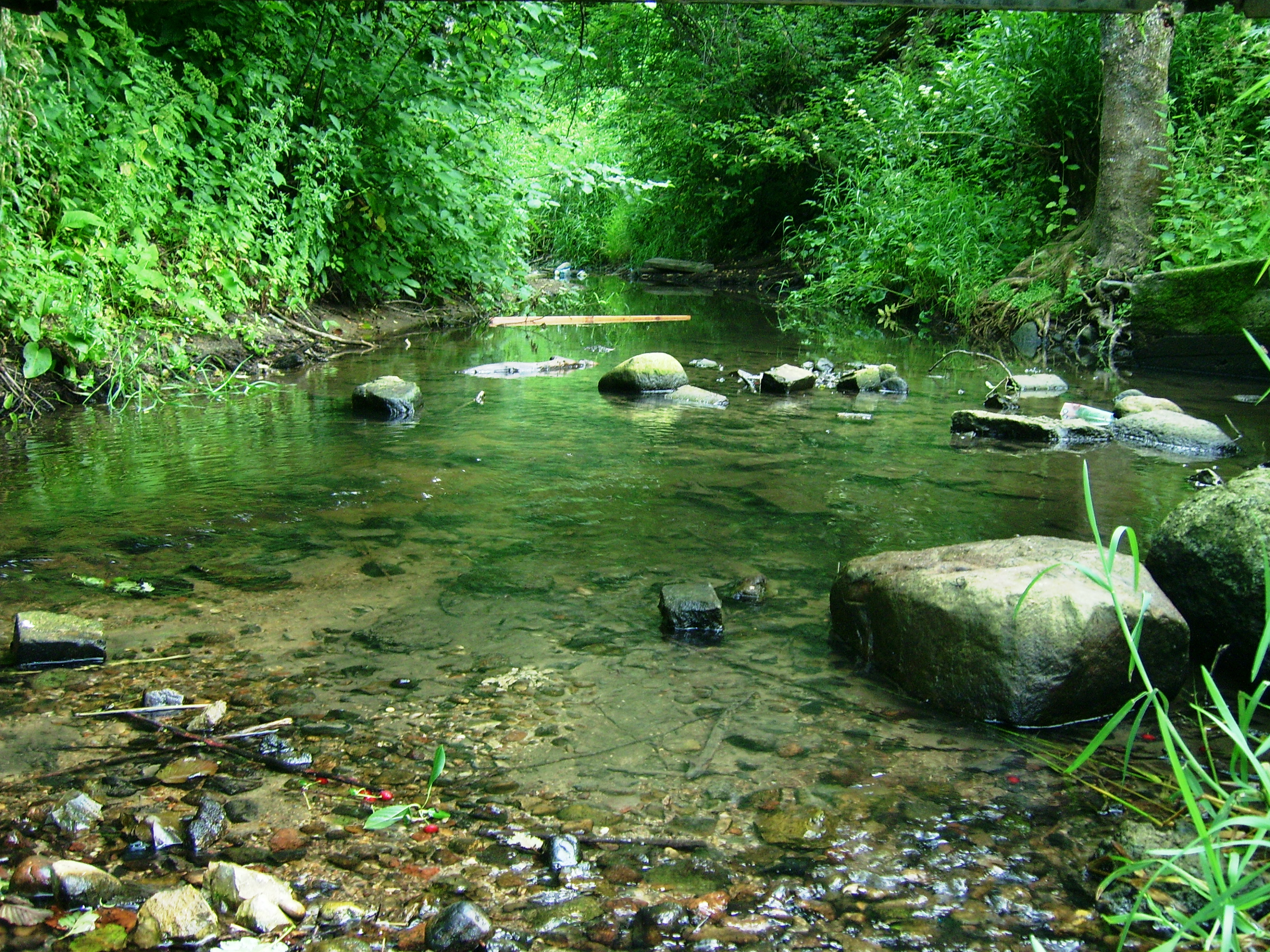 Imsrė ties Jurbarku